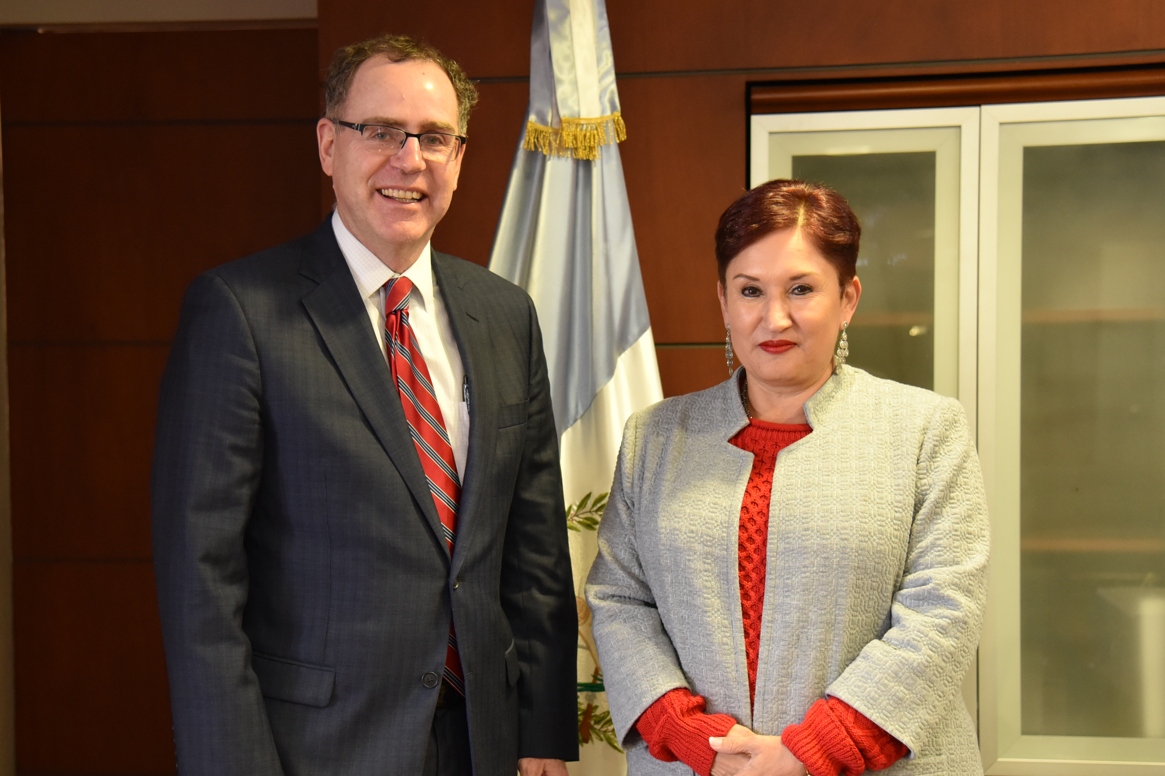 Reunión Subsecreatrio Adjunto Creamer con Fiscal General